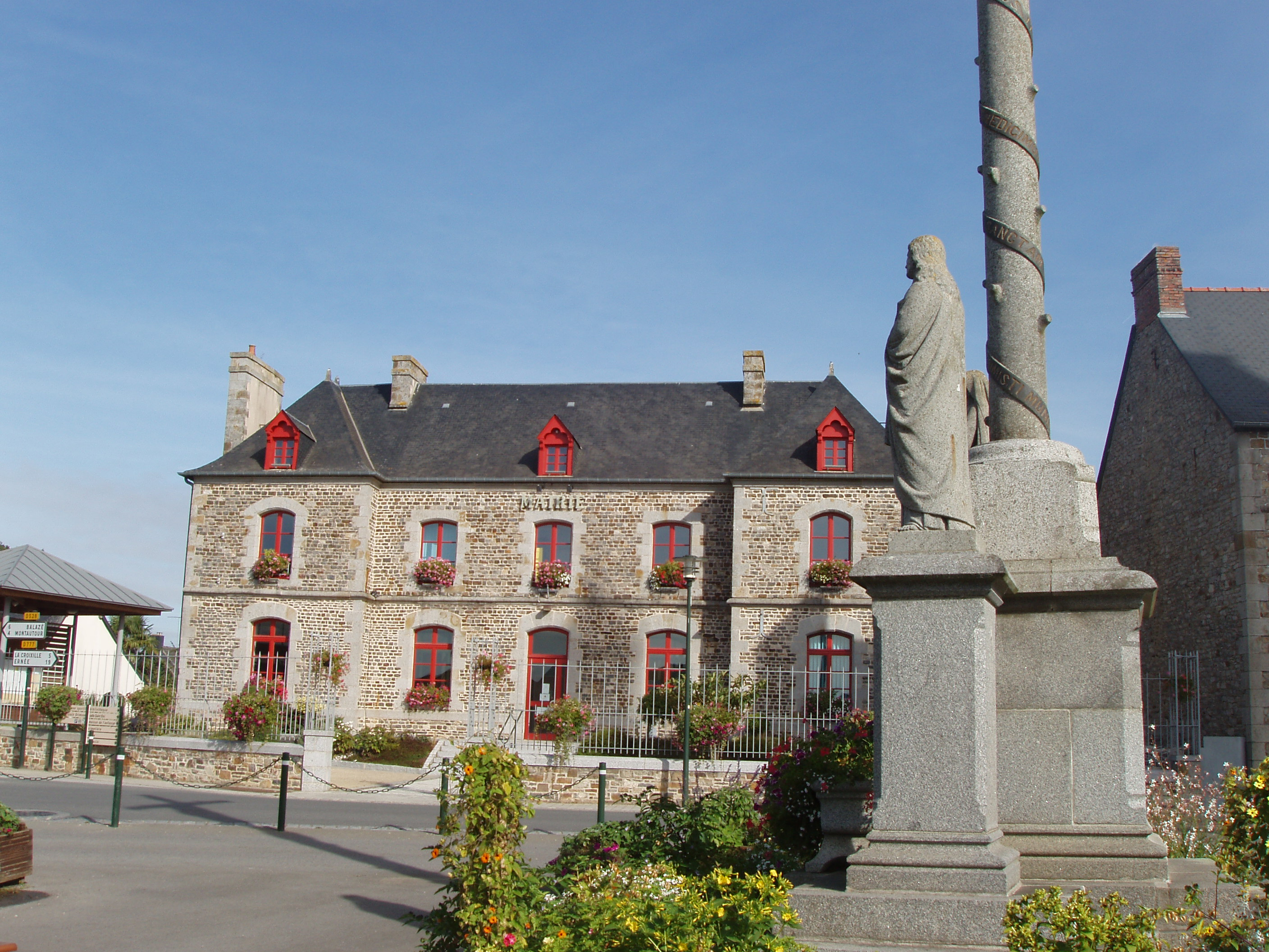 Mairie de Saint-M'Hervé